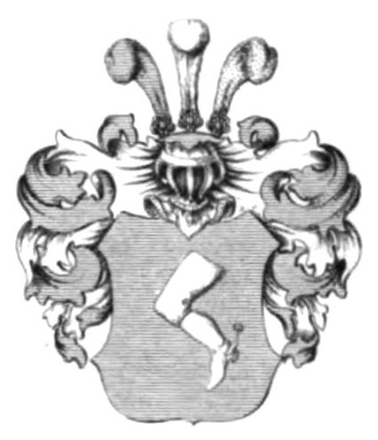 Wappen I des altadligen Geschlechts Steinwehr